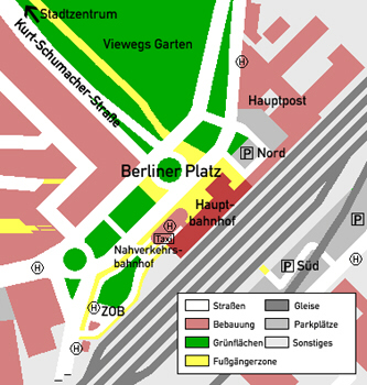 Plan des Berliner Platzes mit Hauptbahnhof in Braunschweig.